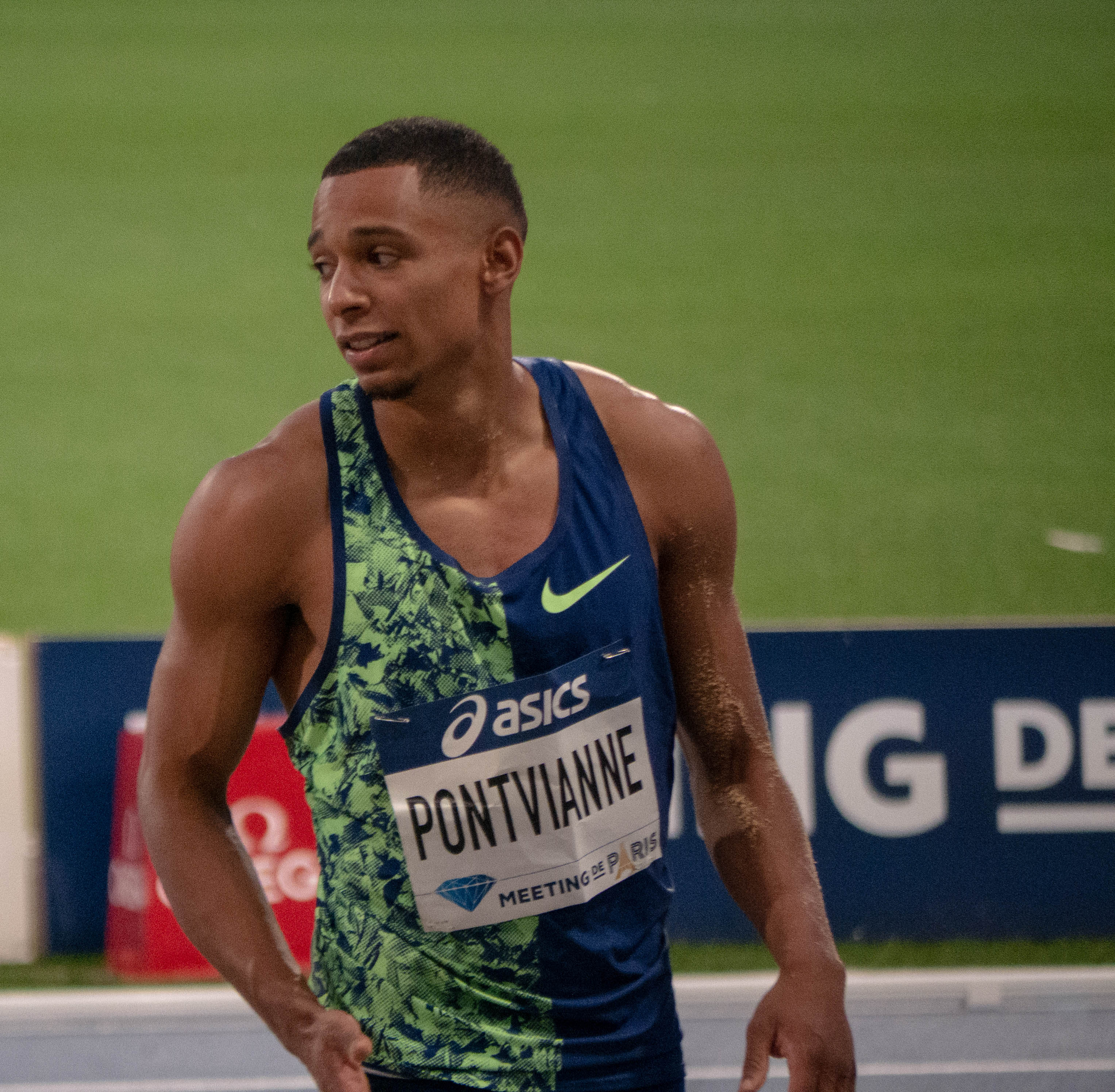 Meeting de Paris 2019 - Compétition d'athlétisme au stade Charlety - 24 août 2019